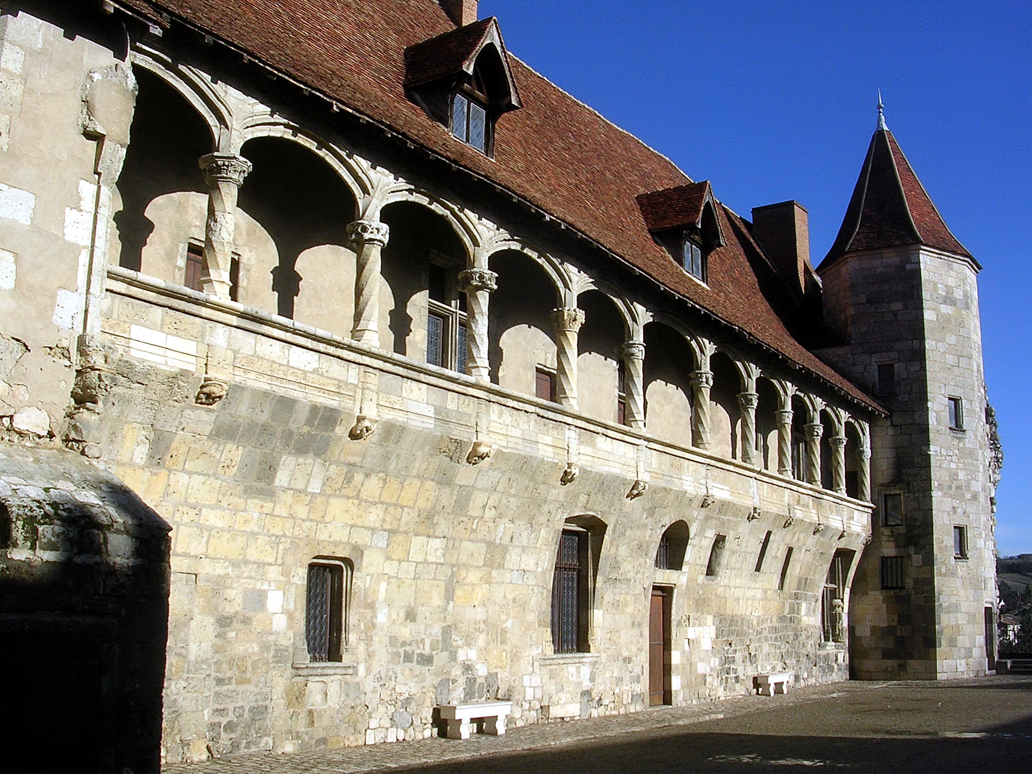 Château de Nérac, Lot-et-Garonne (France)